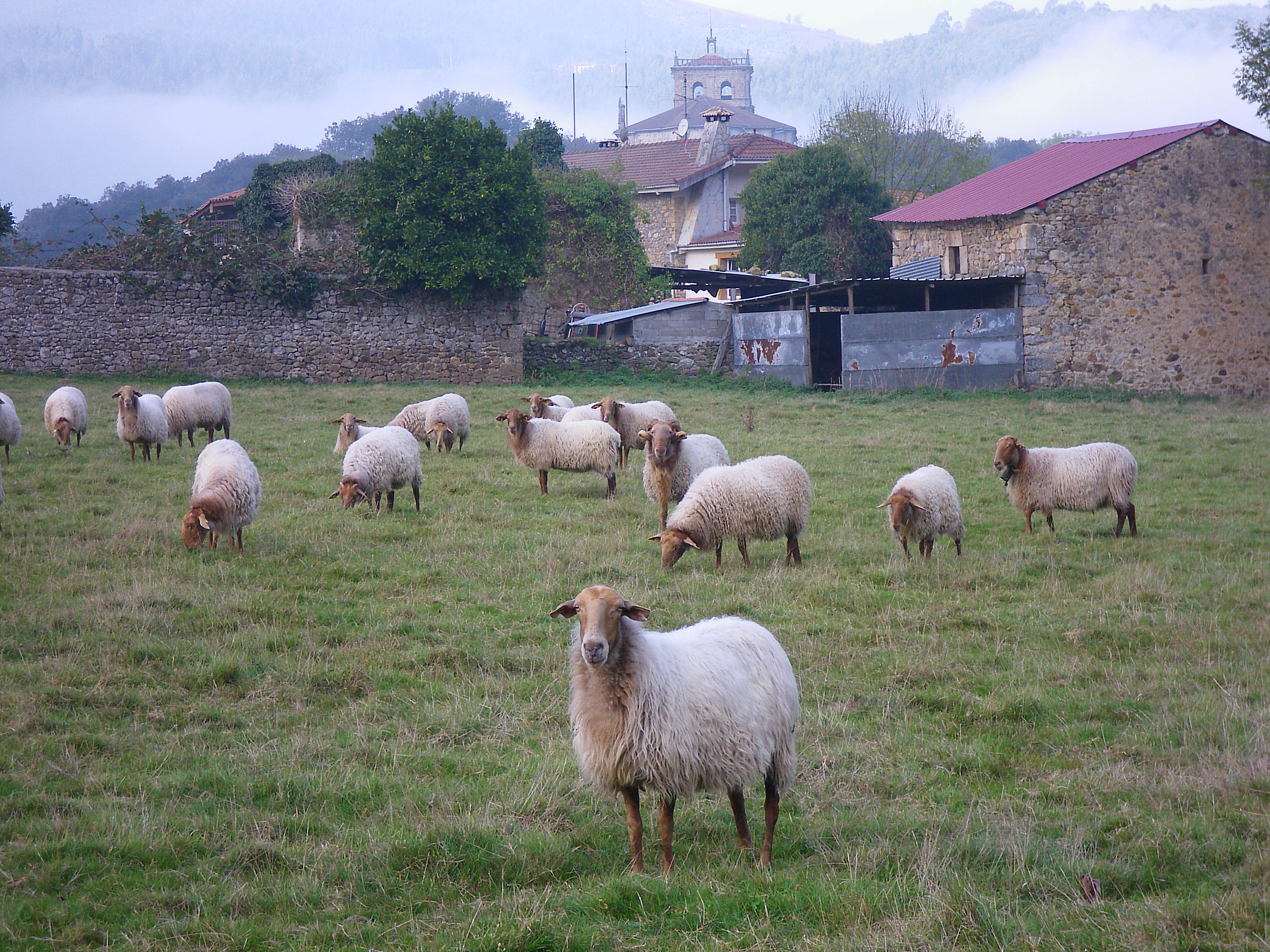 Un rebaño de ovejas pastando, al fondo se ve la iglesia de San Vicente de La Maza, del siglo XVI, en Guriezo, provincia de Santander (Cantabria).